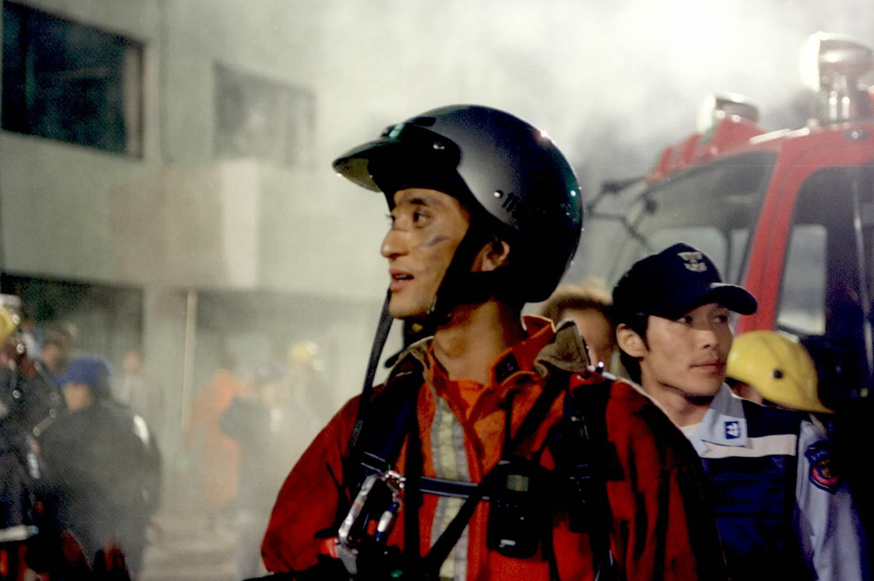 2000 소방 영화 '사이렌'과 '리베라메'